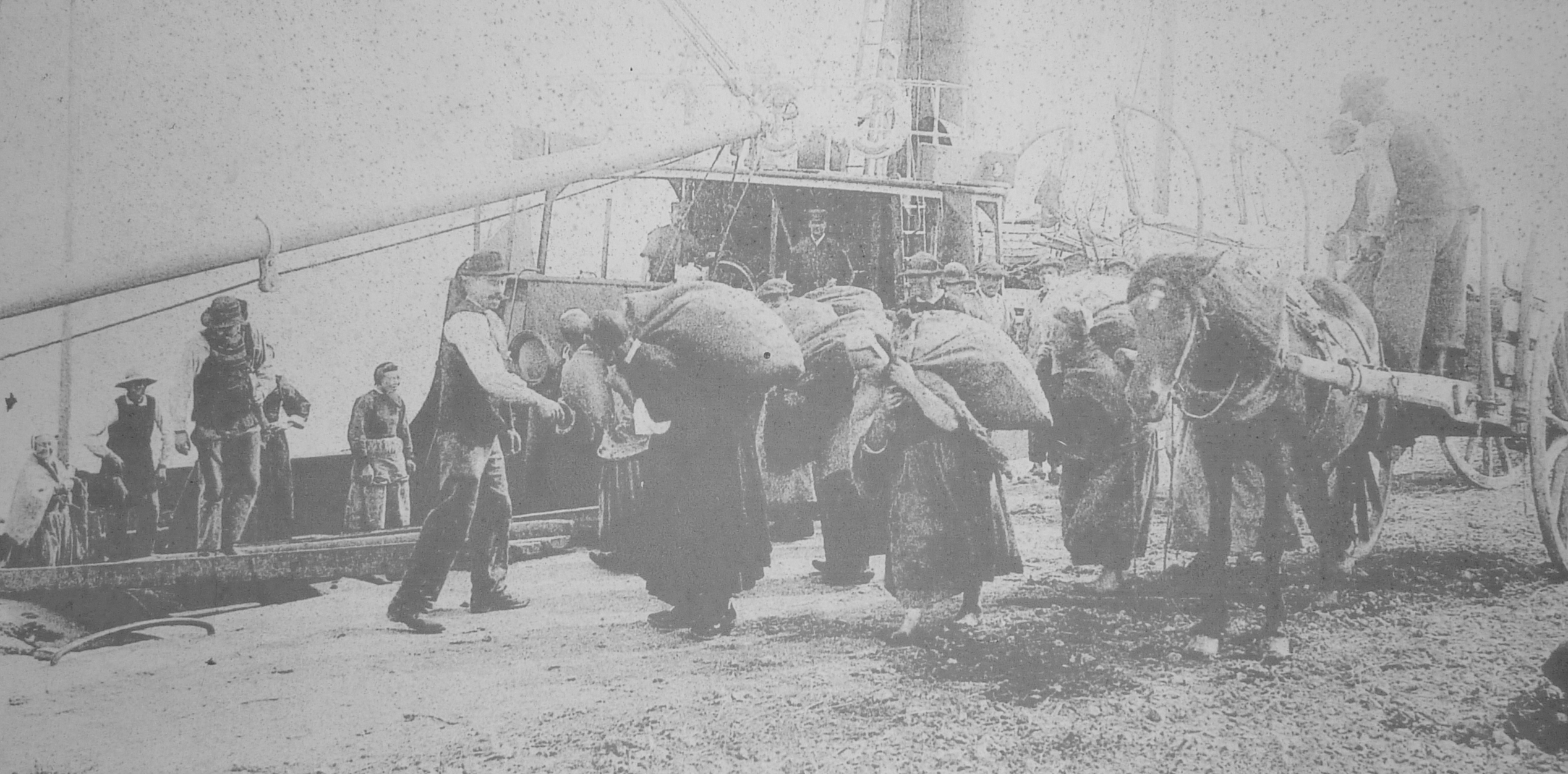 Loctudy : Bigoudènes chargeant des pommes de terre sur un vapeur à destination de l'Angleterre au début du XXème siècle (photographe inconnu)